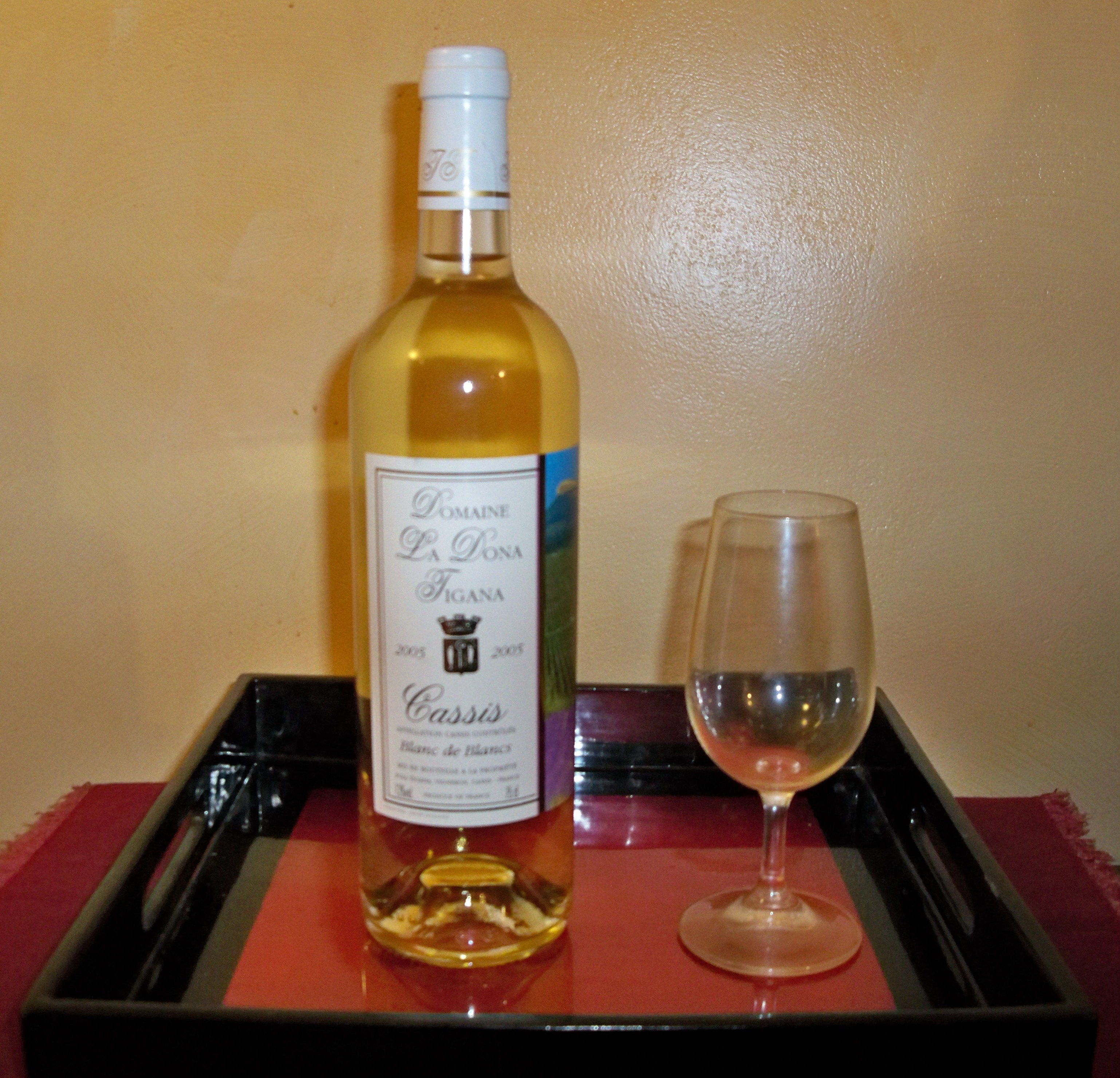 Bouteille de Dona Tigana, Cassis, Bouche du Rhône, France